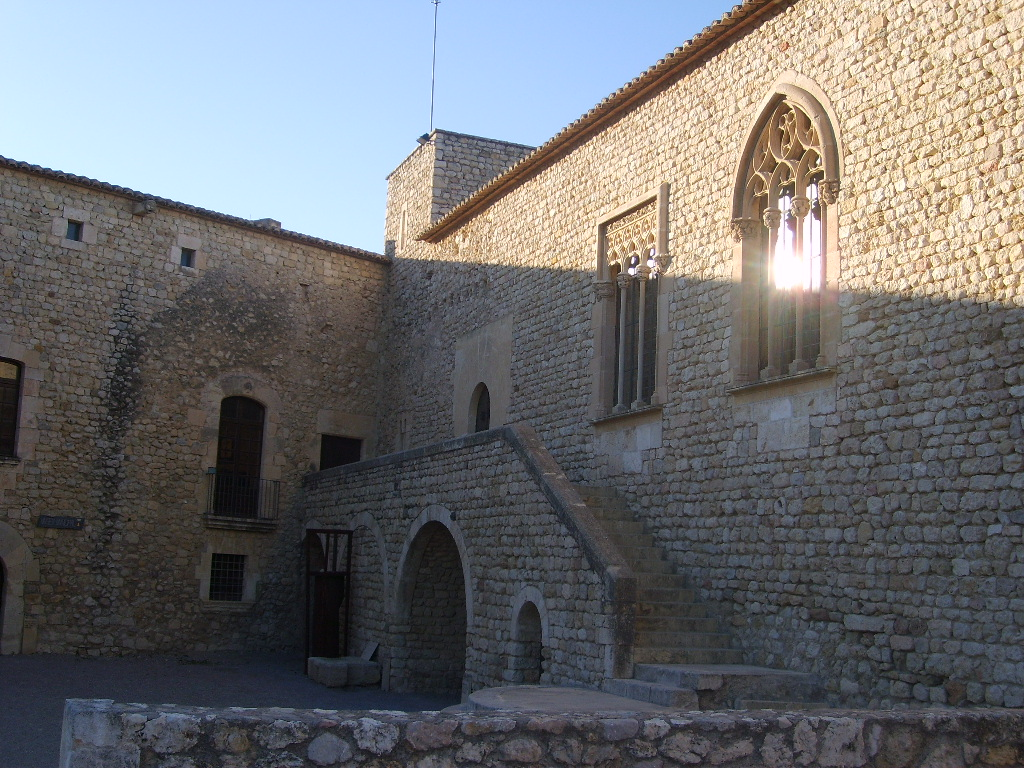 Castell de Sant Martí Sarroca, a l'Alt Penedès, dels segles XII-XIII